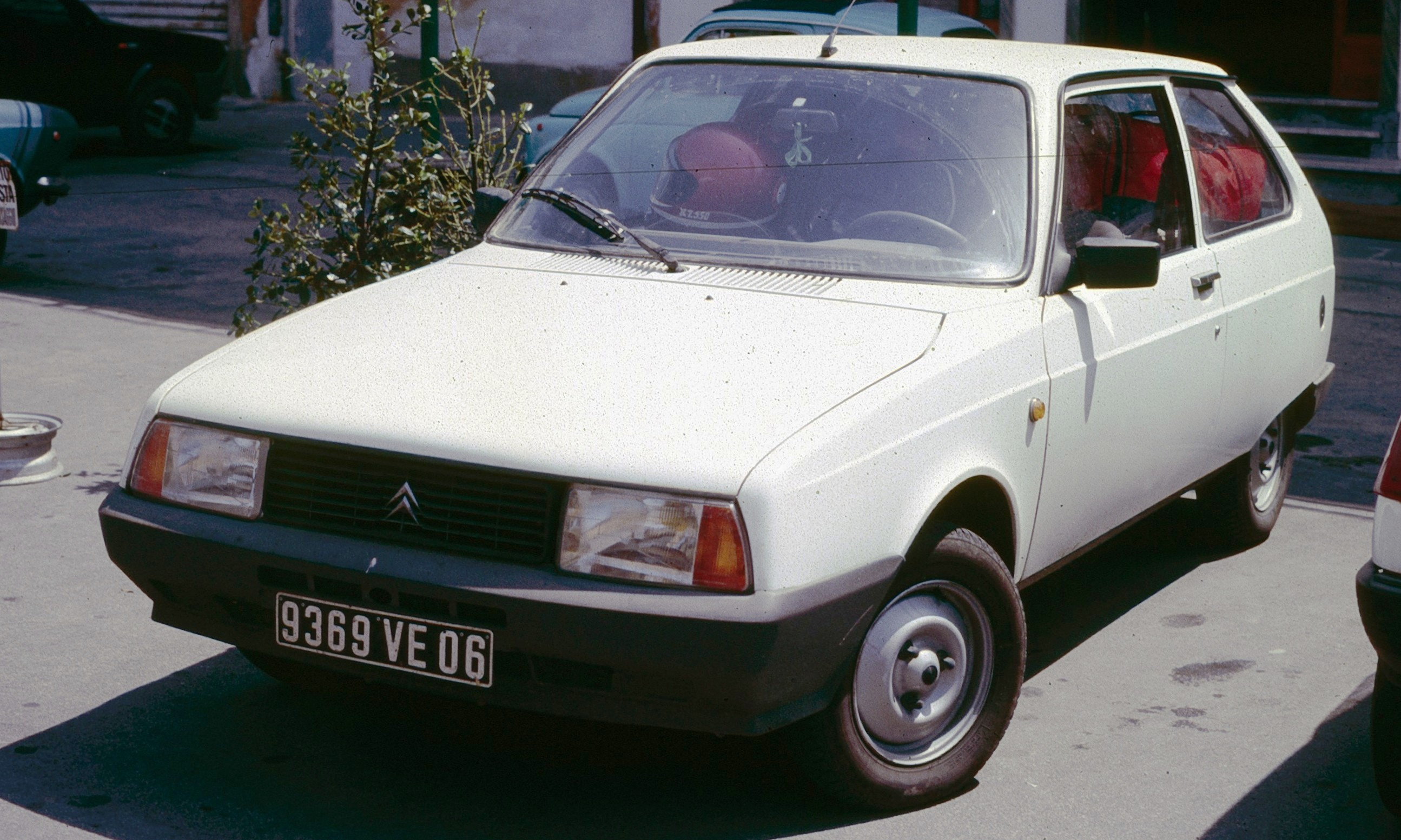 Citroen Oltcit France